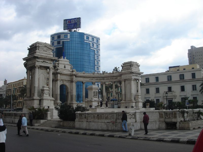 Orabi square Alexandria